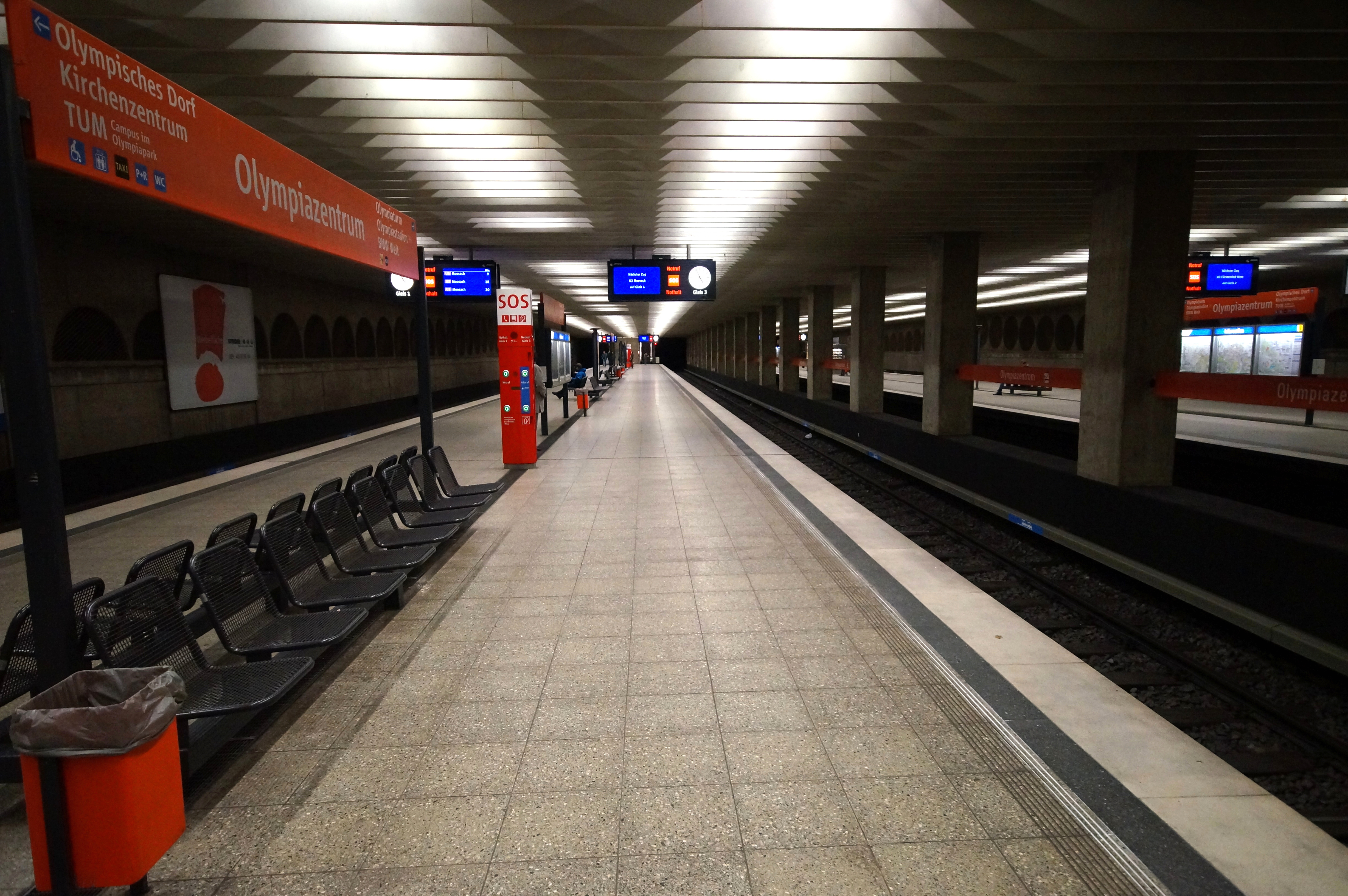 Der U-Bahnhof Olympiazentrum der Linie U 3 der Münchner U-Bahn.